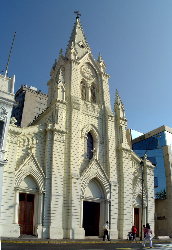 Parroquia San José, Catedral de Antofagasta.